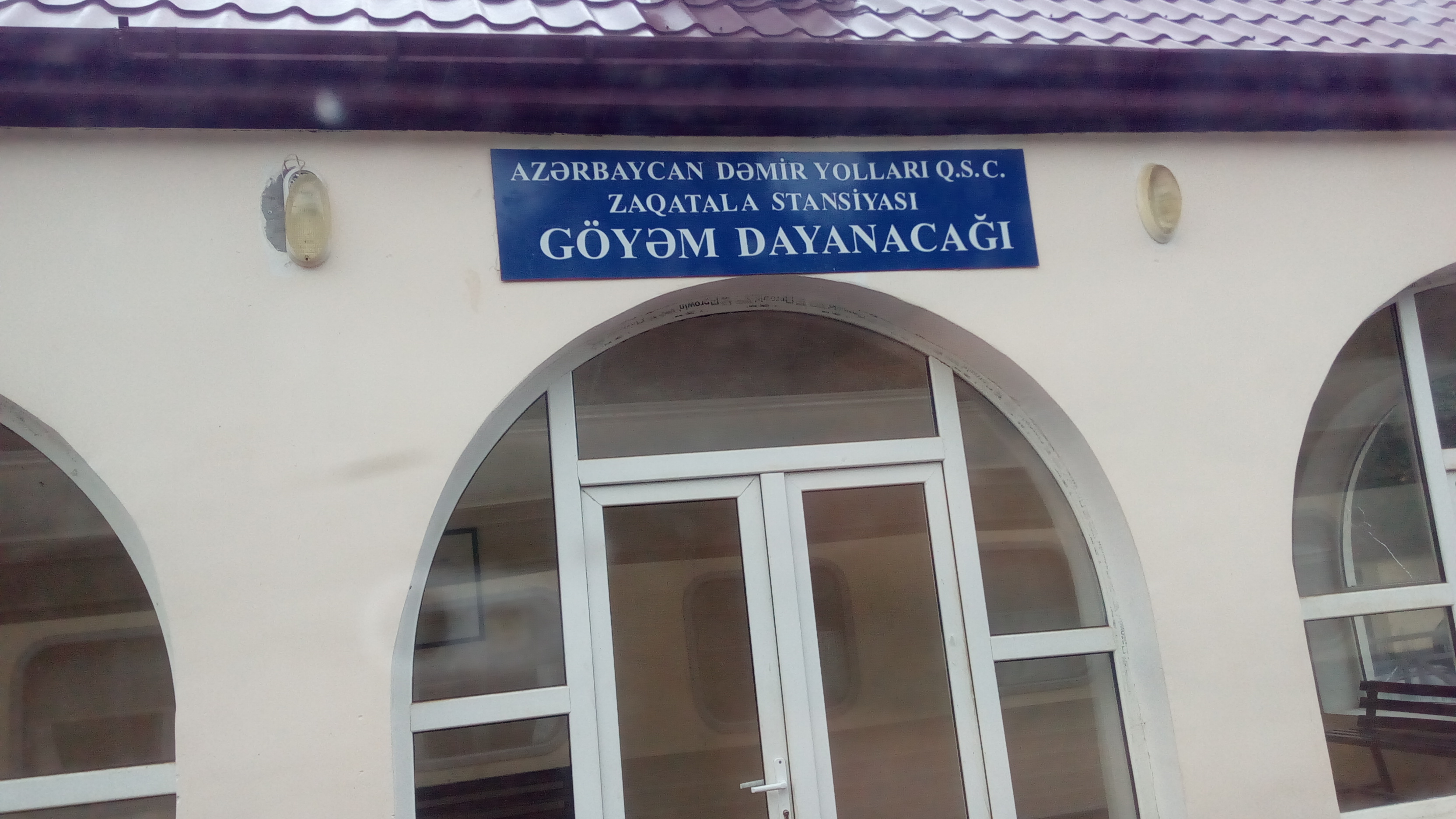 Balakən